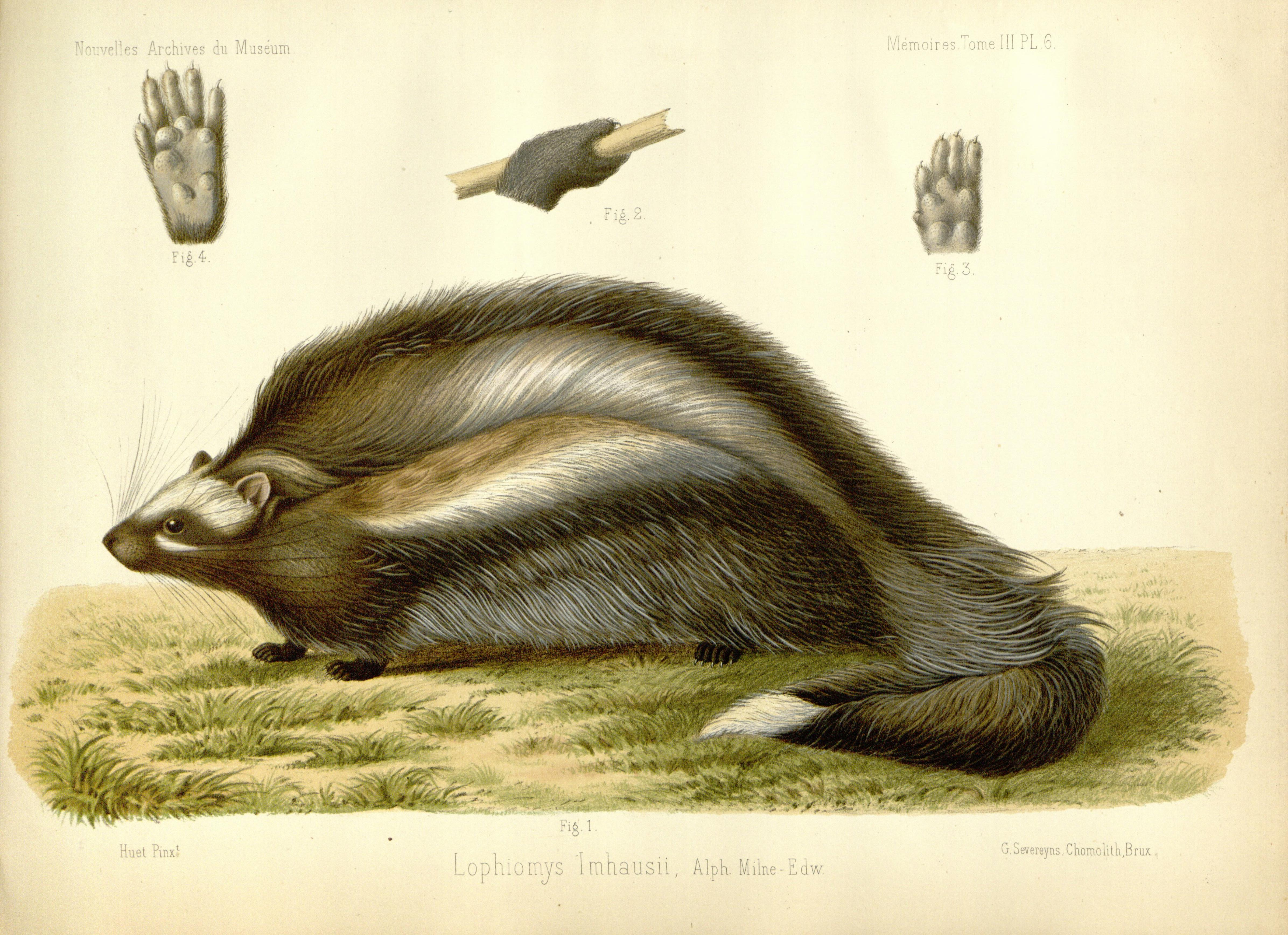 Lophiomys from Nouvelles Archives du Muséum d'Histoire Naturelle de Paris 1867. Same source as File:Lophiomys imhausi.jpg. From page 117: Fig. 1. Lophiomys Imhausii, individu mâle, un peu redui. Fig. 2. Patte postérieure, dessinée d'après l'animal vivant, et montrant la manière dont le pouce s'opposait aux autres doigts pour saisir les objects. Fig. 3. Pied de devant, vu en dessous, montrant les lobes de la paume. Fig. 4. Pied de derrière, vu en dessous.